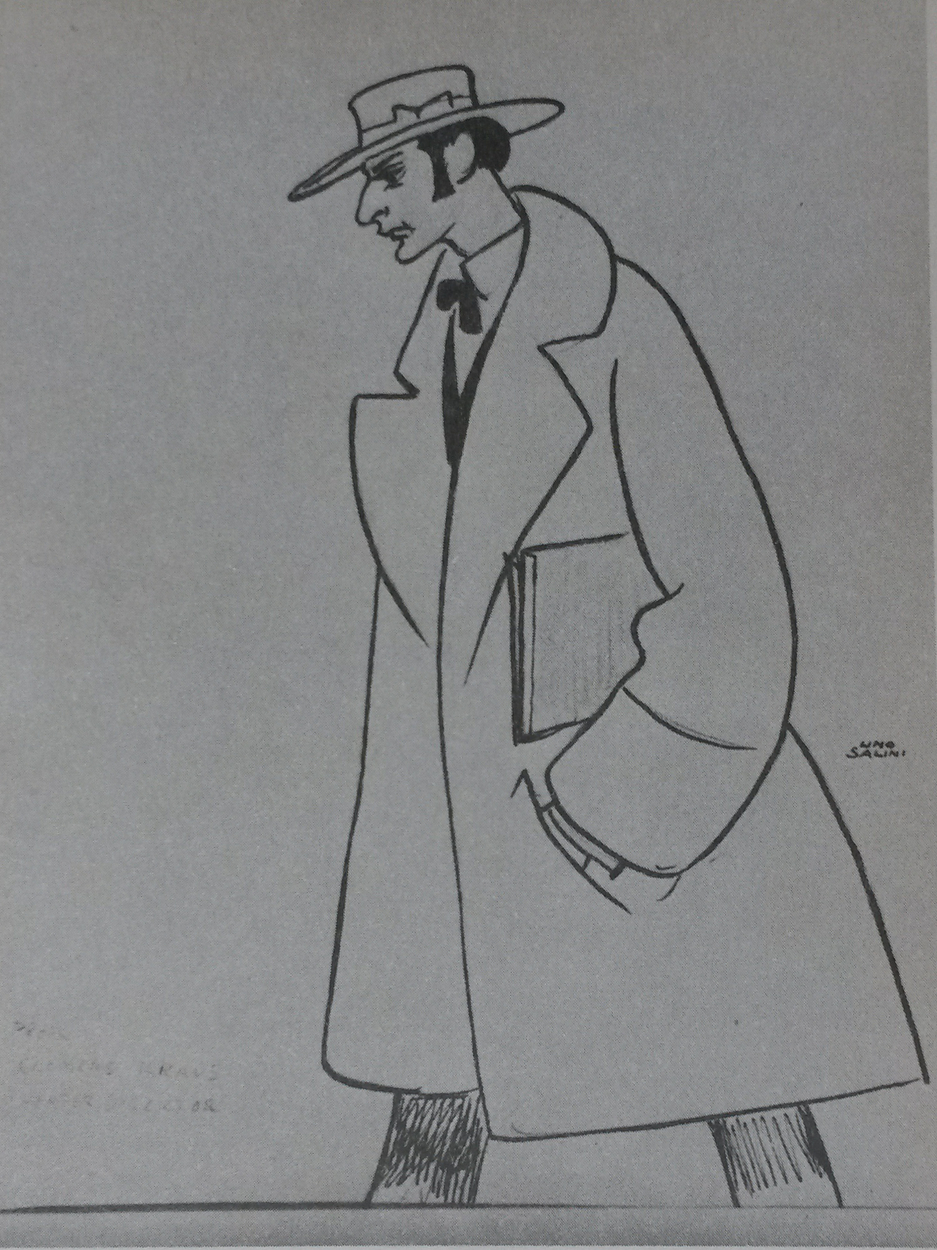 Der Dirigent Clemens Krauss. Zeichungen von Lino Salini.